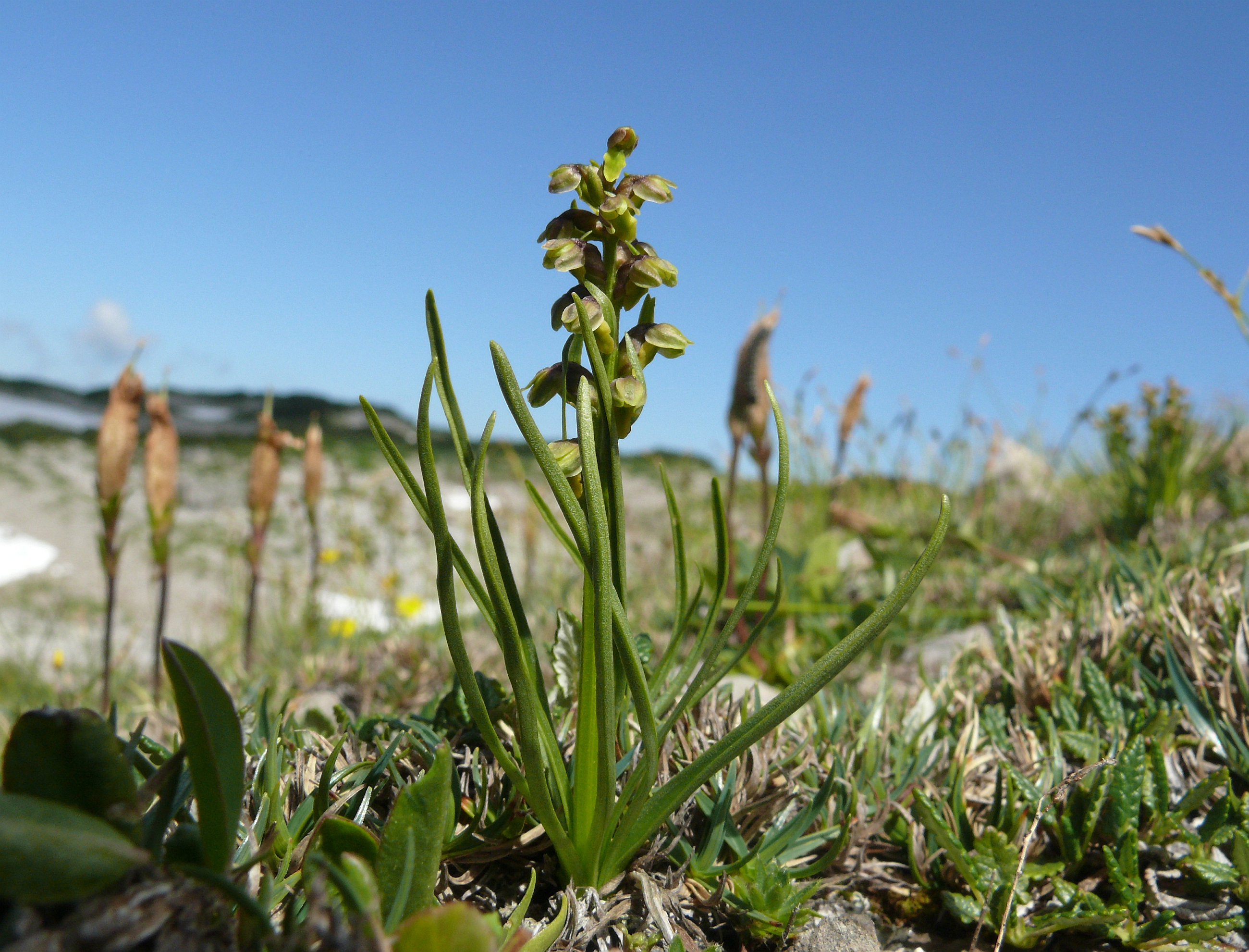 Chamorchis alpina, Allgäuer Alpen, Österreich